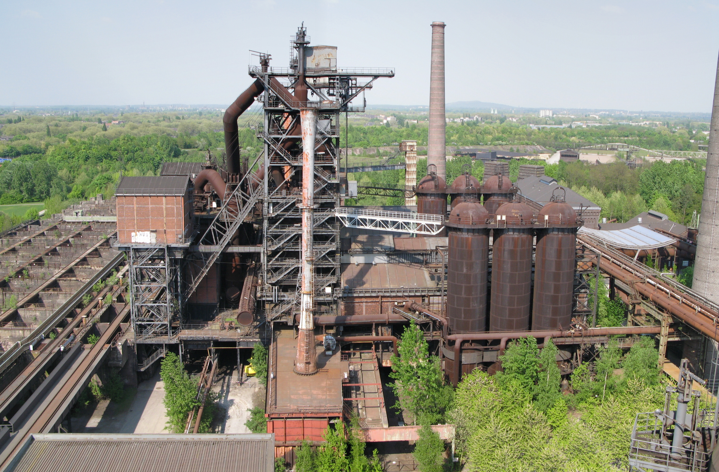 Landschaftspark Duisburg-Nord - Hochofenanlage 2 vom Hochofen 5 aus gesehen- zusammengesetzt aus den Quelldateien Bauteile von links nach rechts: Bunker, Windenhaus, Gichtgasleitungen mit Staubsack, Schrägaufzug zur Beschickung, Hochofen, Abstich-Halle, Winderhitzer